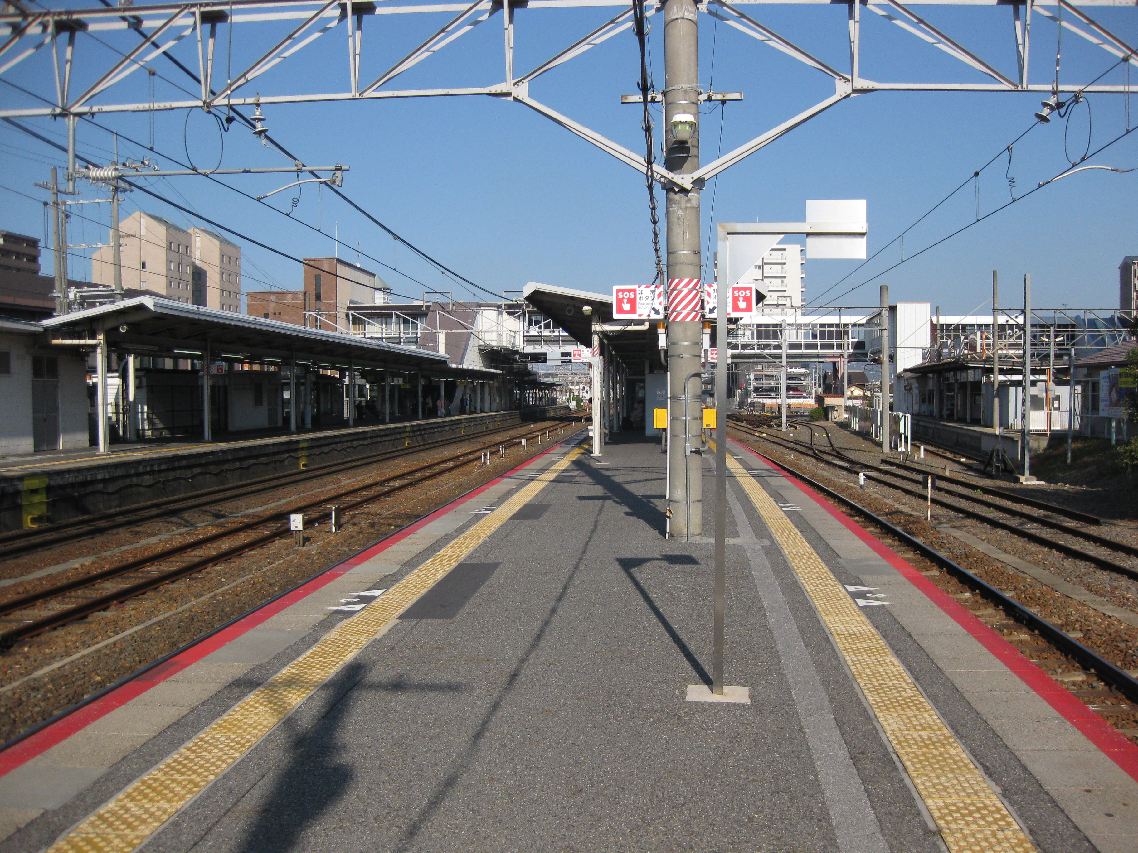 近江八幡駅プラットホーム